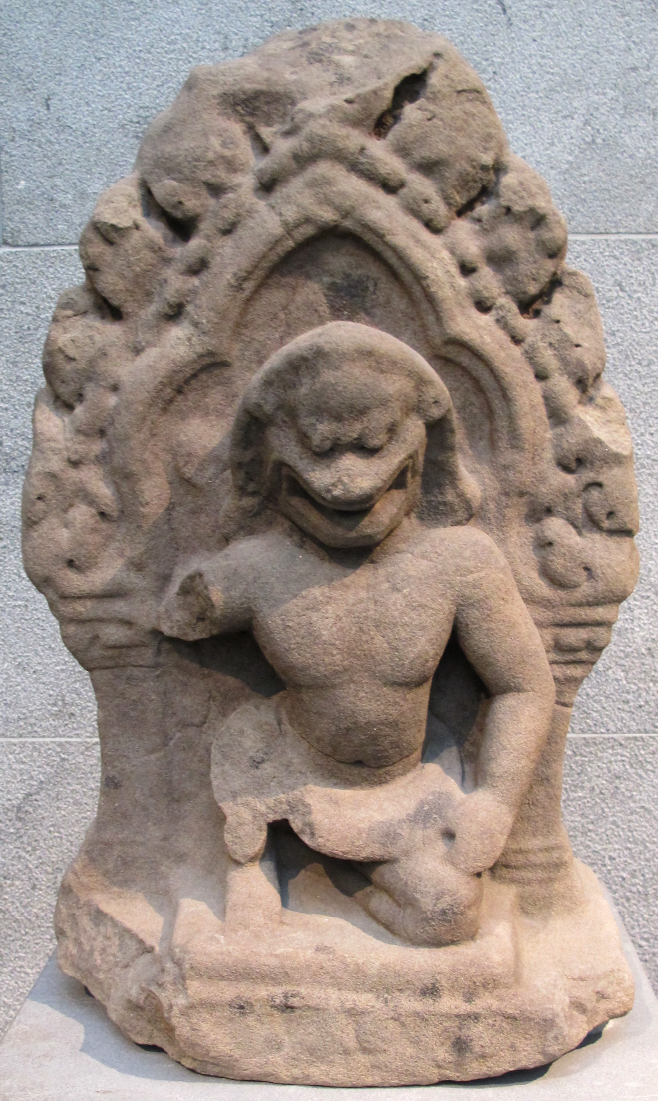 Cambogia, antefissa da tempio a est di khleang nord (angkor thom), stile di banteay srei, 950-975 ca.